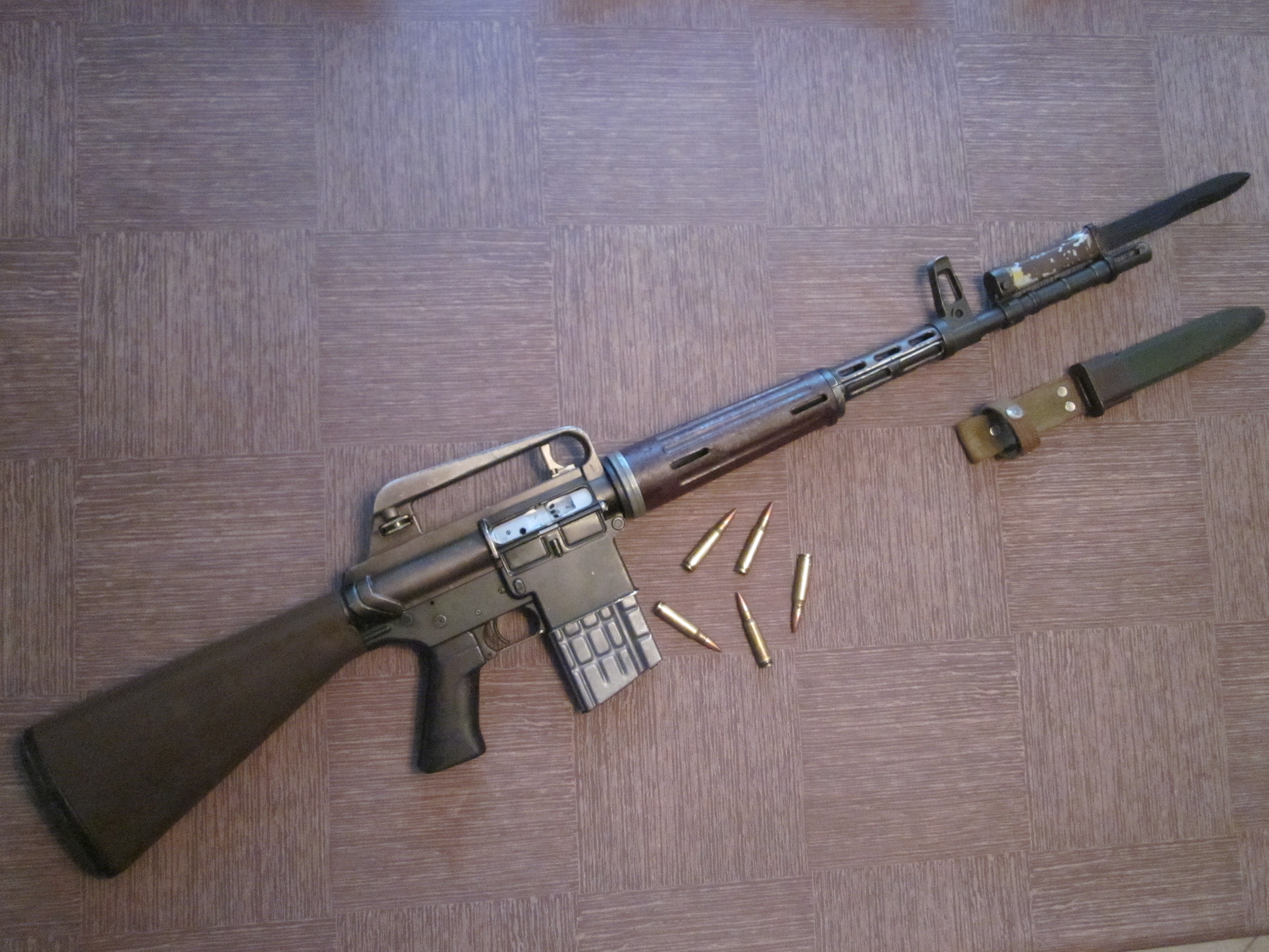 photo AR10